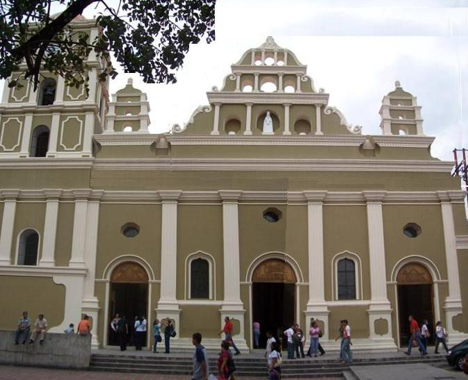 Vista Frontal de la Iglesia católica de Tovar, Mérida, Venezuela